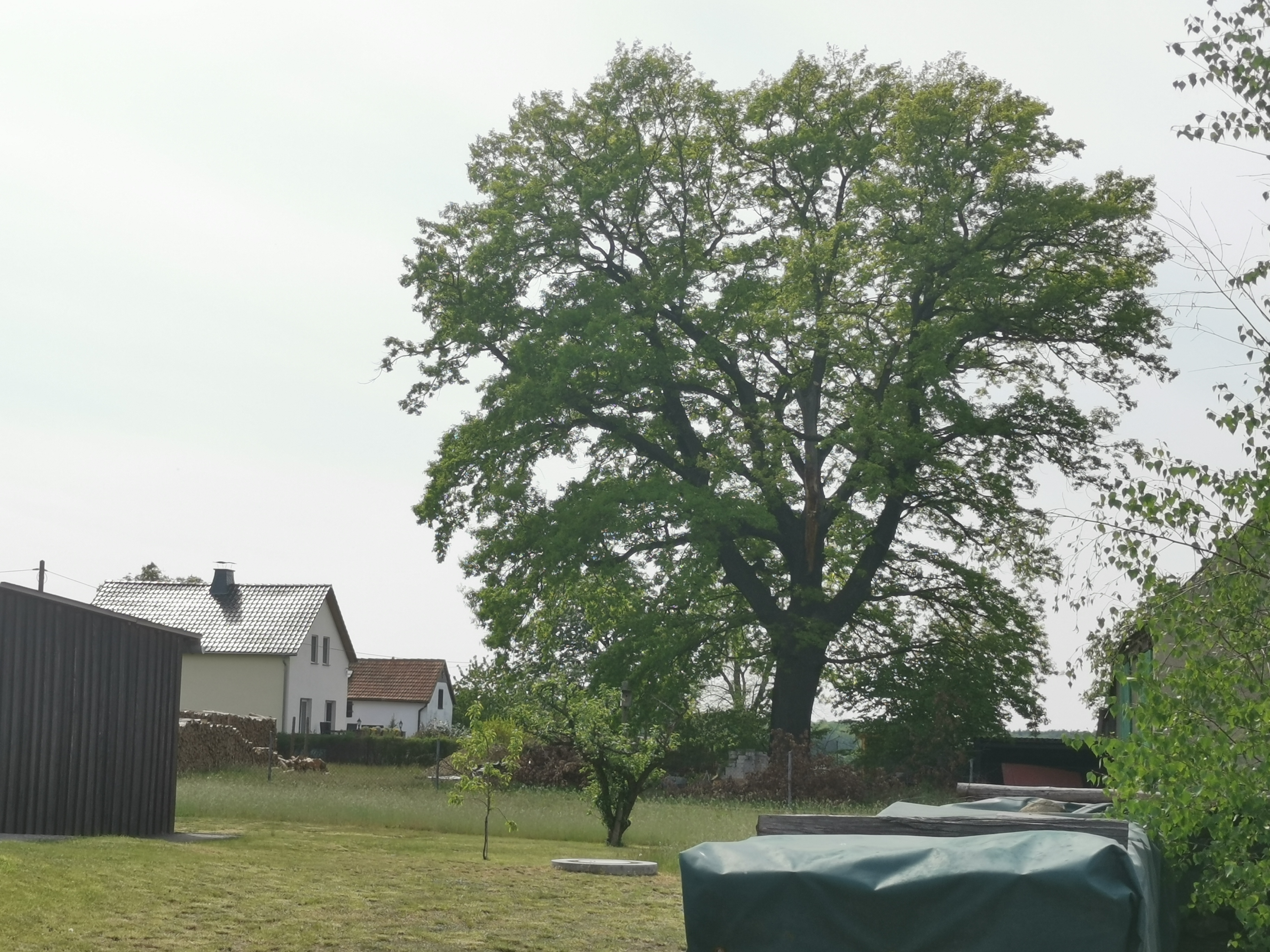 Als Naturdenkmal geschützte Stieleiche in Lipsa neben der Scheune Jannowitzer Weg 2